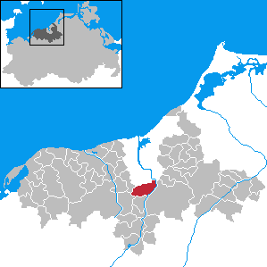 Papendorf in Mecklenburg-Western Pomerania - District Bad Doberan